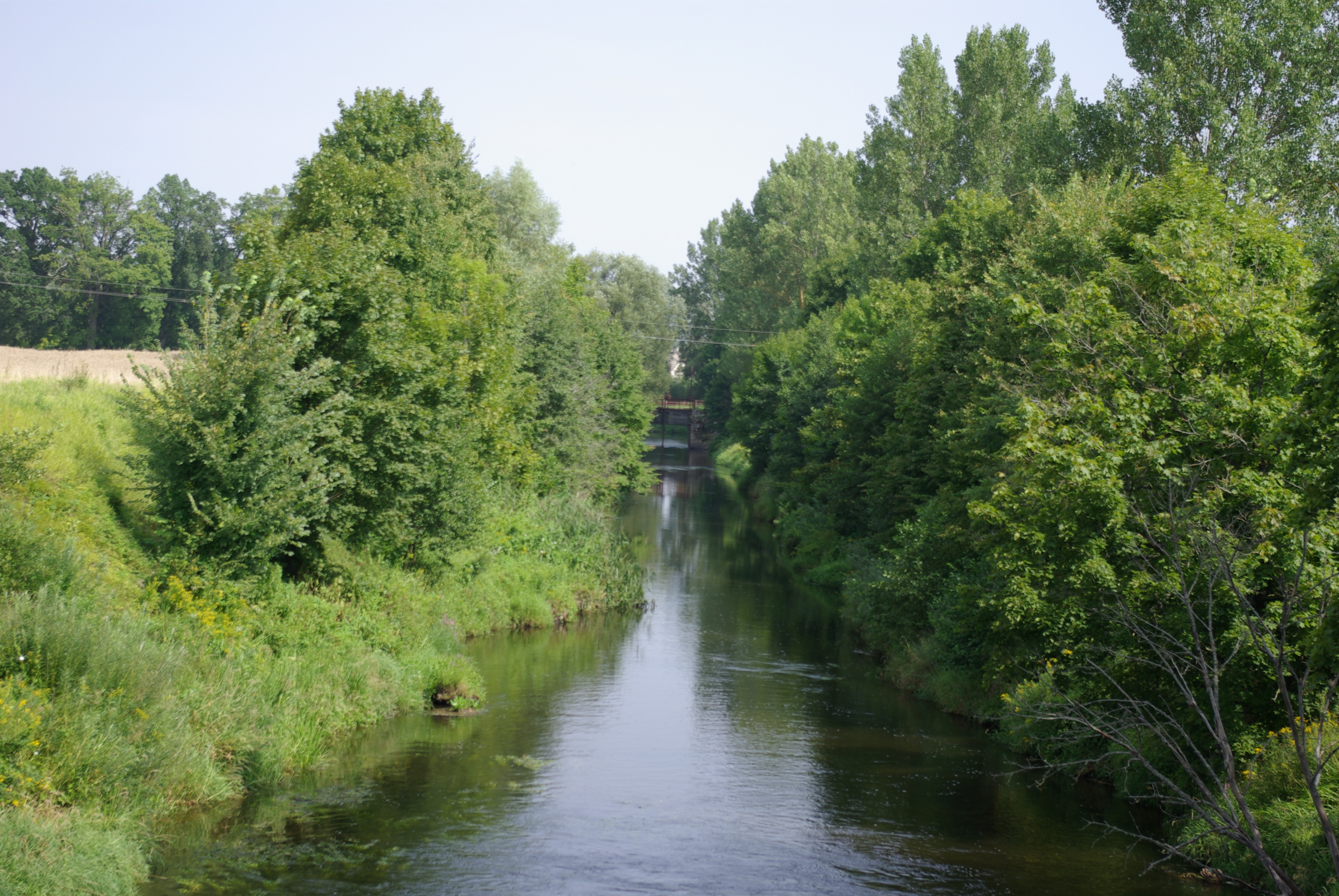 Der Fluss Węgorapa (dt. Angerapp) im polnischen Mieduniszki Wielkie (dt. Groß Medunischken, 1928-1938 Medunischken, 1938-1945: Großmedien) in der Gemeinde Banie Mazurskie (dt. Benkheim)